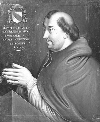 Portrait de Pierre de la Baume (1477-1544), évêque de Genève